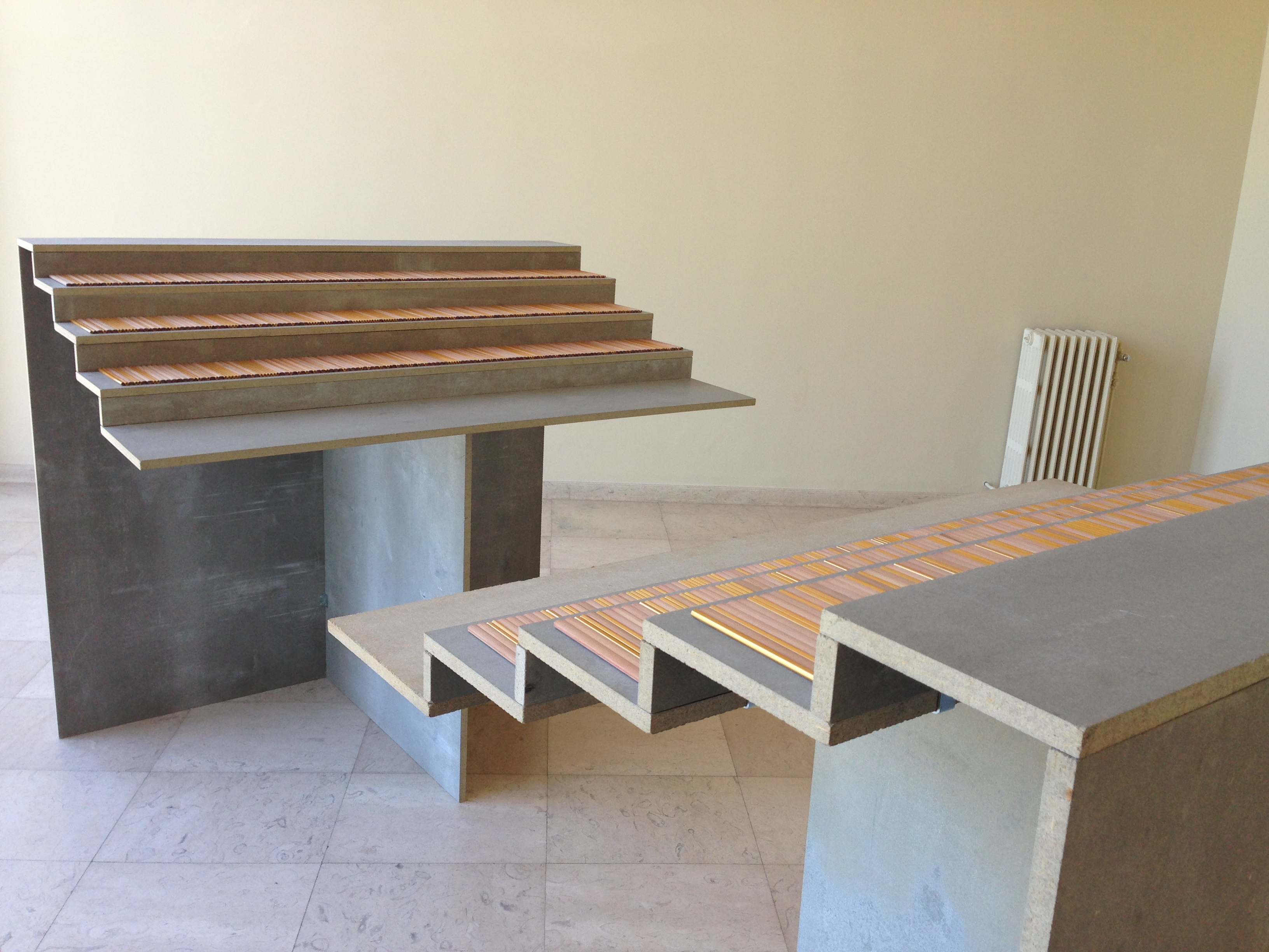 View of "Tratado de Encenação" by Pedro Barateiro, in Serralves, Oporto.